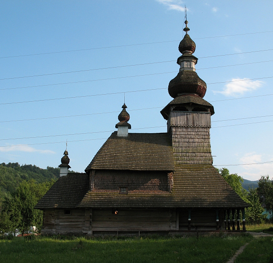 Церква св. Миколи у Сваляві